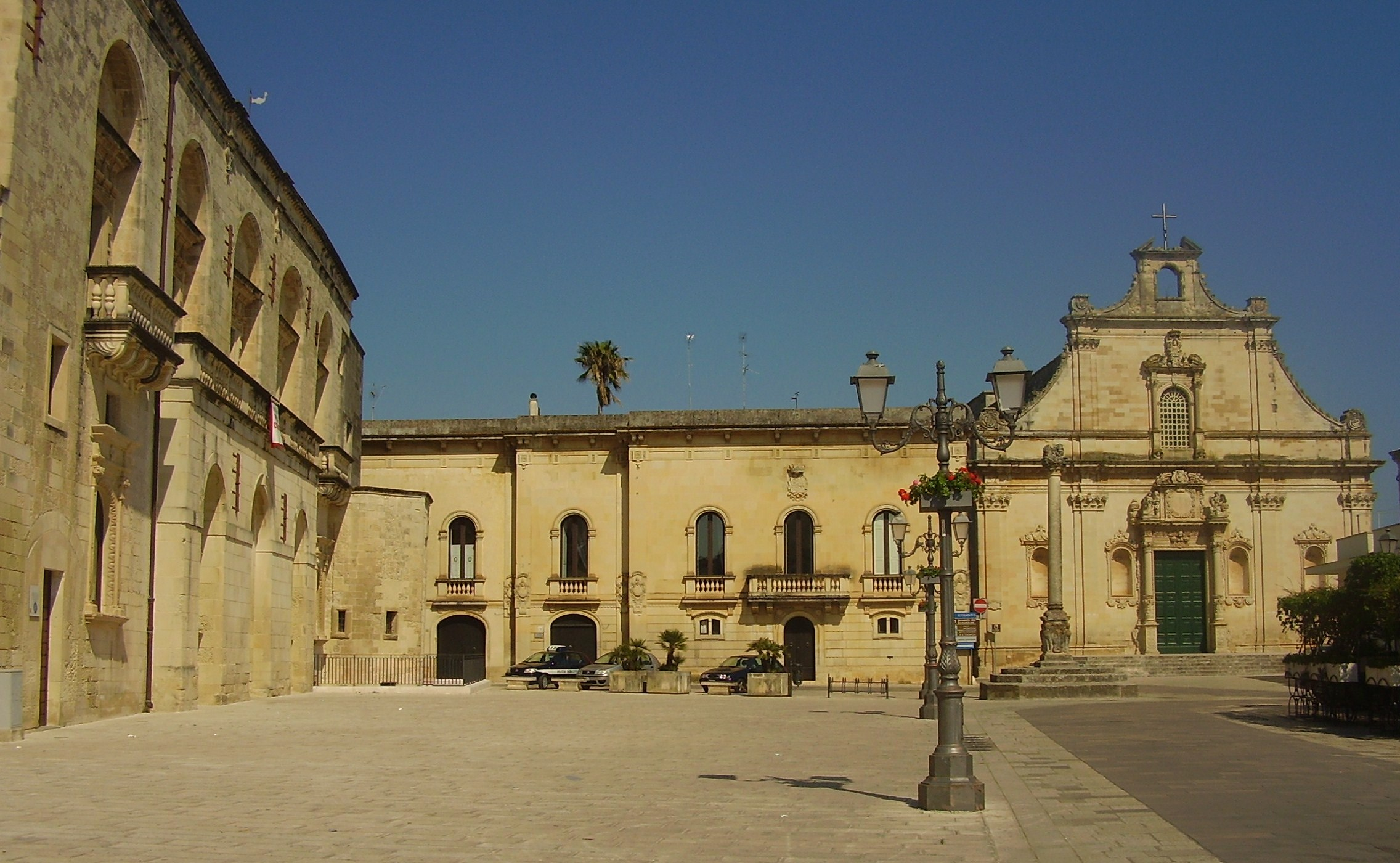 Muro L. Piazza del Popolo